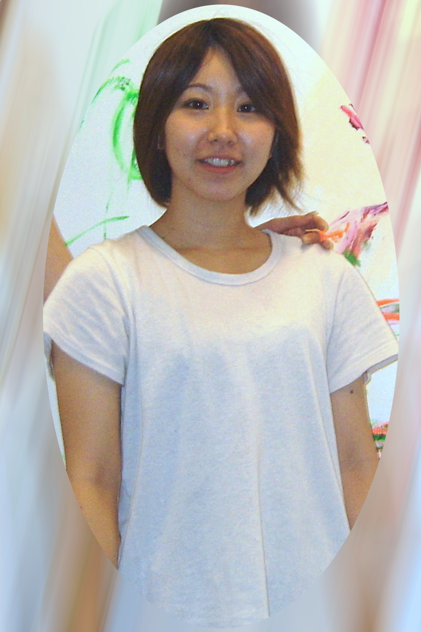 Art Taipei 2008: Ayako Rokkaku.